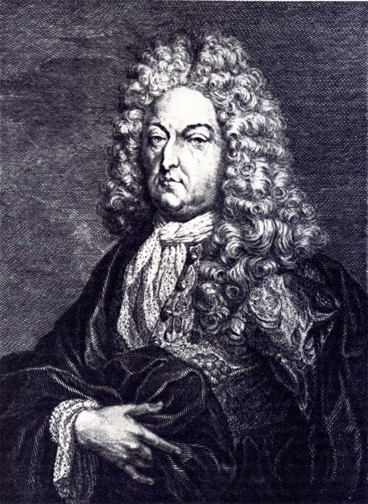 Bruno van der Dussen (1660-1741), pensionaris en burgemeester van Gouda, diplomaat van de Republiek der Zeven Verenigde Nederlanden